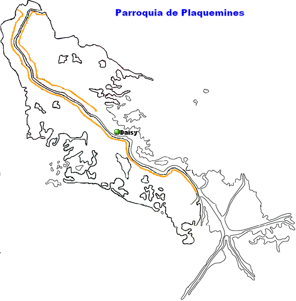 Daisy, Louisiana